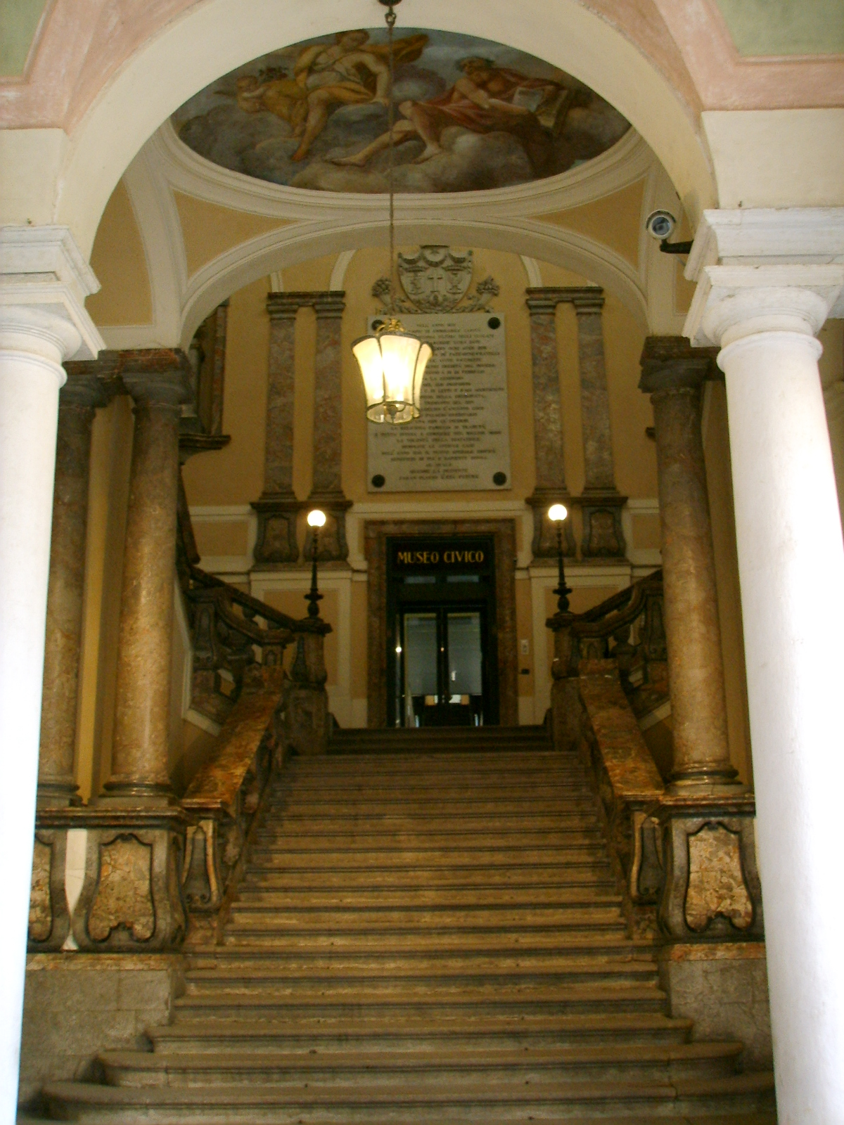 Cremona, museo civico, ingresso